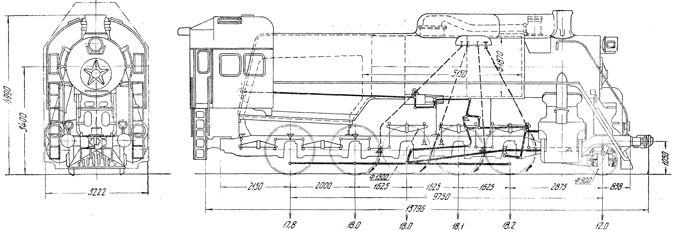 Основные размеры паровоза Л